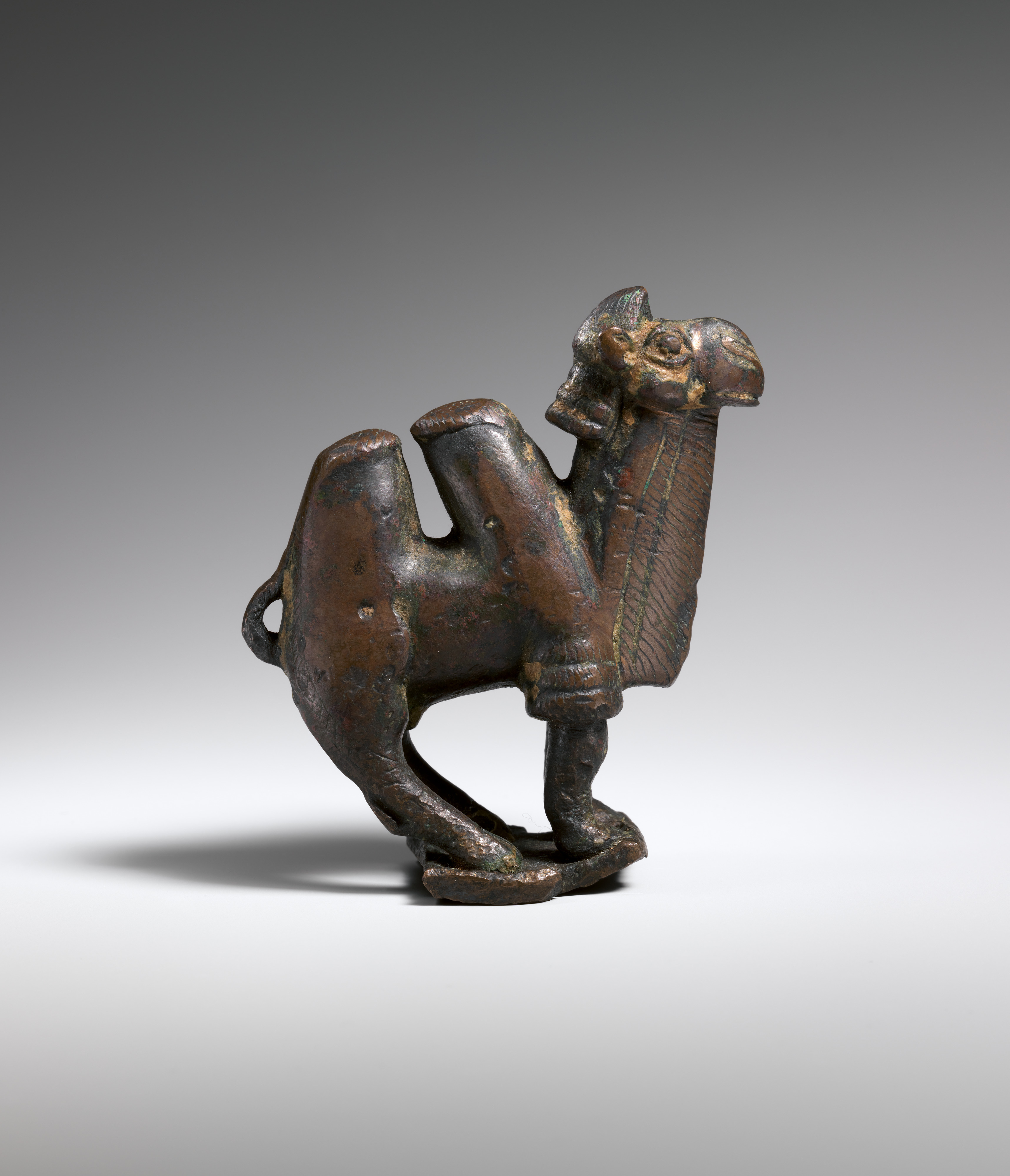 Bactria-Margiana Archaeological Complex; Sculpture; Metalwork-Sculpture